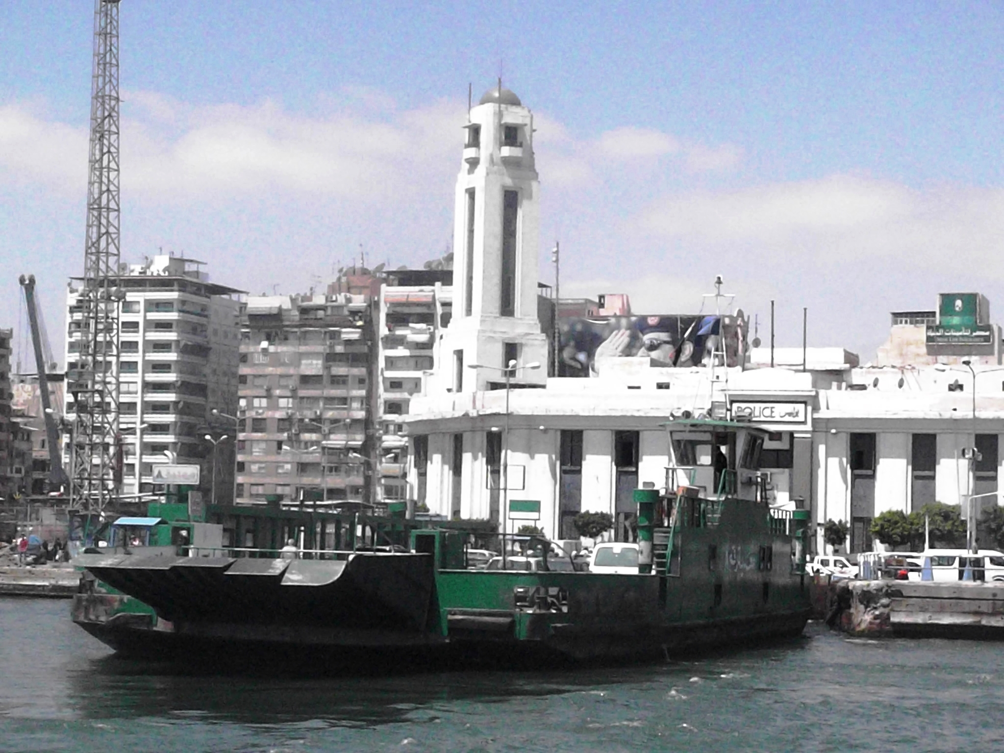 مدخل قناة السويس عند بورفؤاد والمجمع الإسلامي.